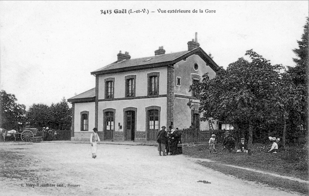 Le bâtiment et la cour voyageurs de la gare vers 1900.